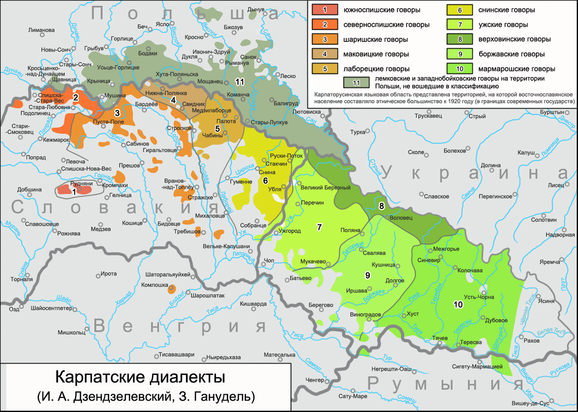 Дронов М. Ю. Роль Греко-католической церкви в формировании этнонациональной идентичности русинов Словакии (1919—1938) — диссертация на соискание ученой степени кандидата исторических наук. — Москва: Институт славяноведения РАН, 2013. — С. 269 Приложение № 1. Карта расселения карпатских русинов в 1919—1939 гг.; Маґочiй П. Р. Народ нивыдкы. Iлустрована iсторiя карпаторусинôв / По русинськы текст потовмачив Падяк В. — Ужгород: 2007. — С. 70.; Маґочiй П. Р. Map of Dialects of Karpathian Rus’.